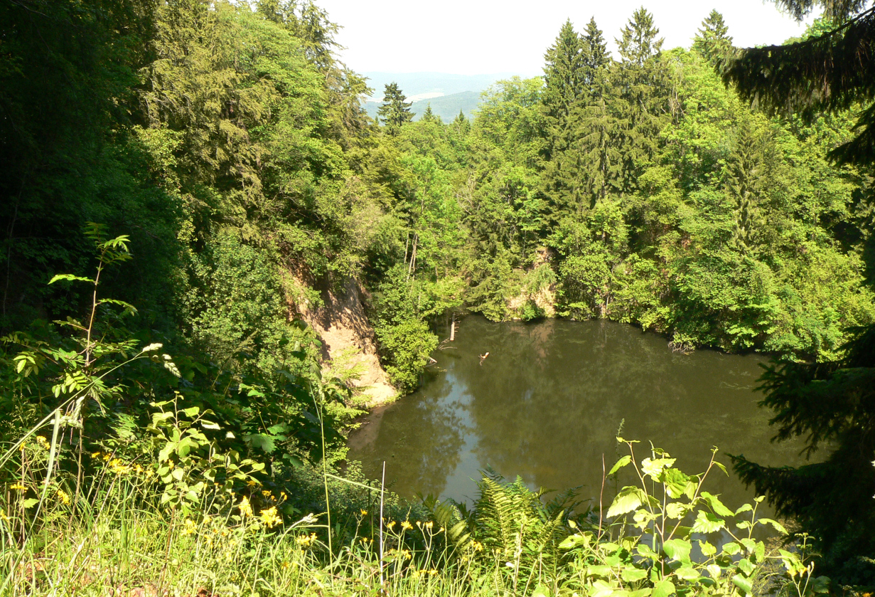 Blick auf das Naturdenkmal Roter See von der Aussichtsplattform